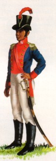 Andaluces